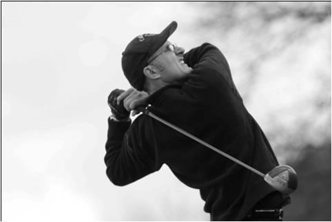 T.Godineau